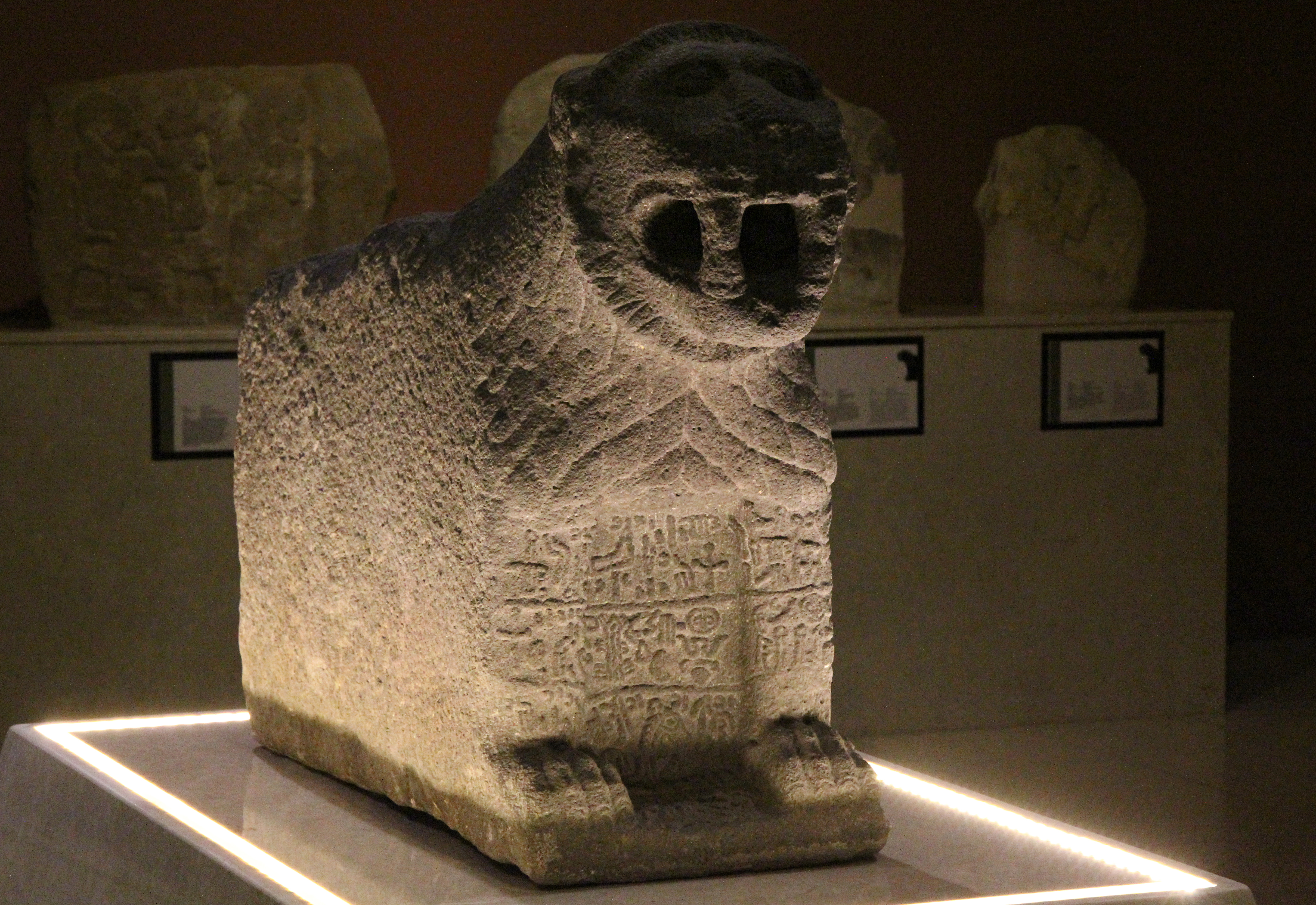 Archäologisches Museum Kahramanmaraş, Türkei, späthethitischer Portallöwe mit Inschrift aus der Zitadelle von Kahramanmaraş